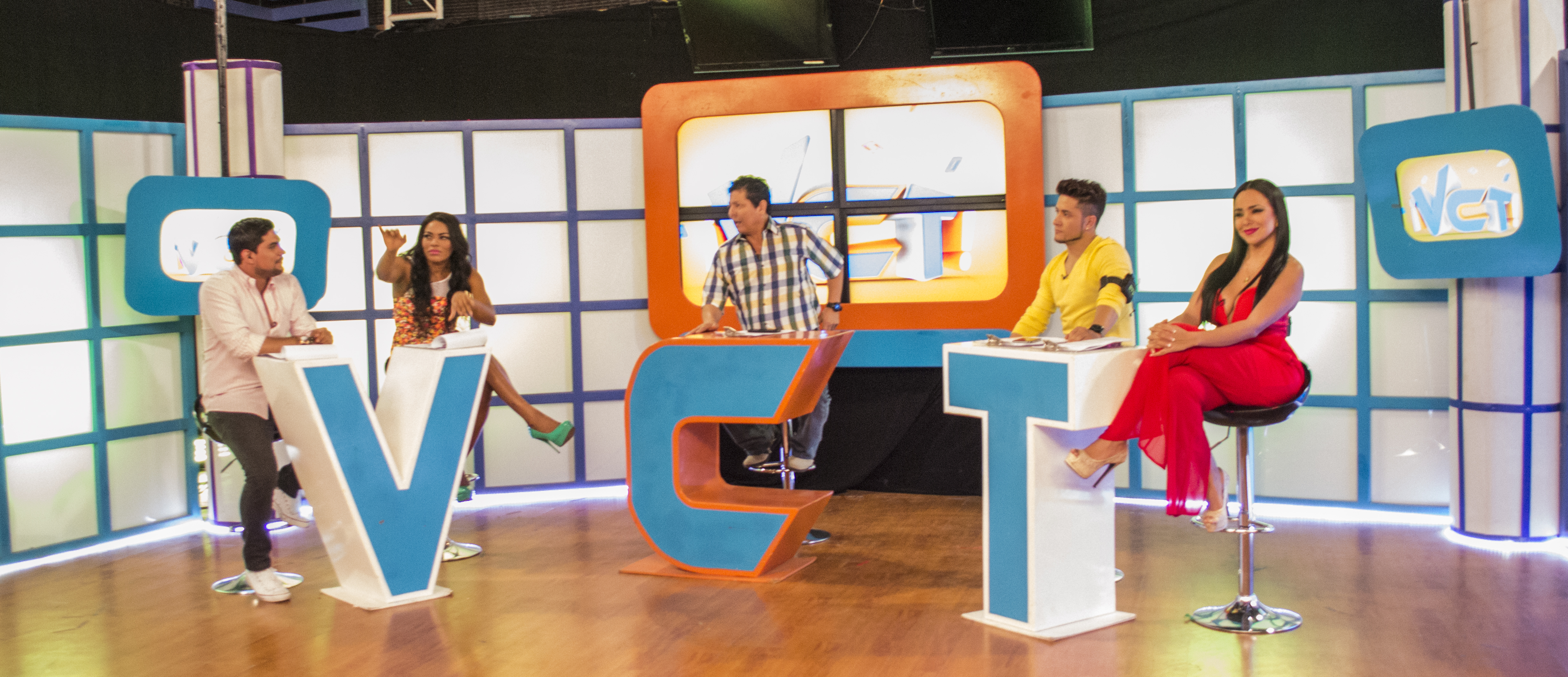 Set del programa de farándula ecuatoriana Vamos con Todo de Red Telesistema con los presentadores Emilio Pinargote, Denisse Angulo, Oswaldo Segura, Jorge Heredia y Adriana Sánchez "La Bomba" el 28 de octubre de 2014.